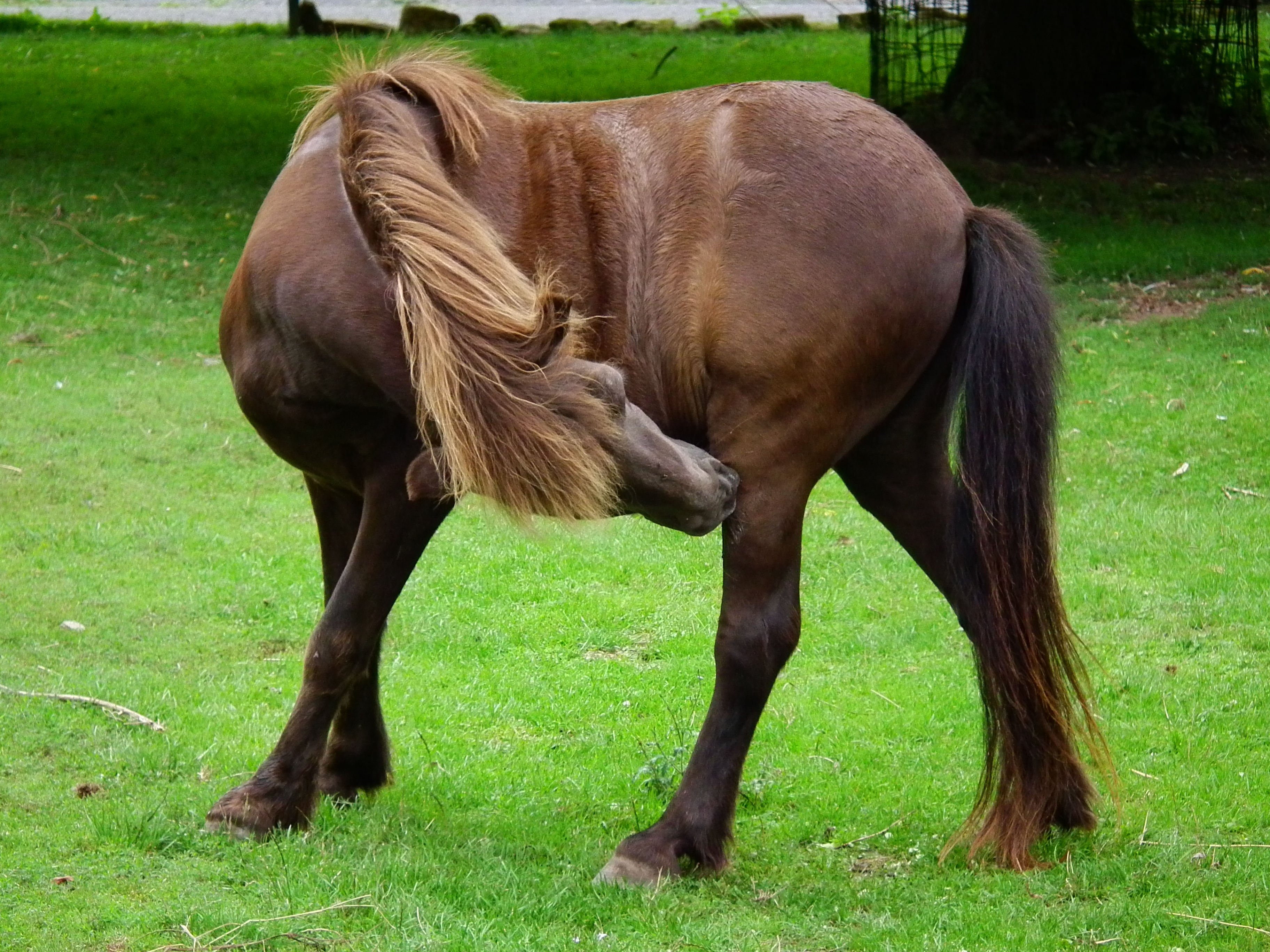 Shetlandponyhengst im Kleintierpark Bad Schönborn (Baden-Württemberg, Deutschland)